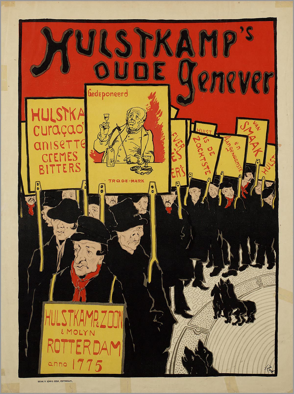 Affiche. Hulstkamps Oude Jenever.